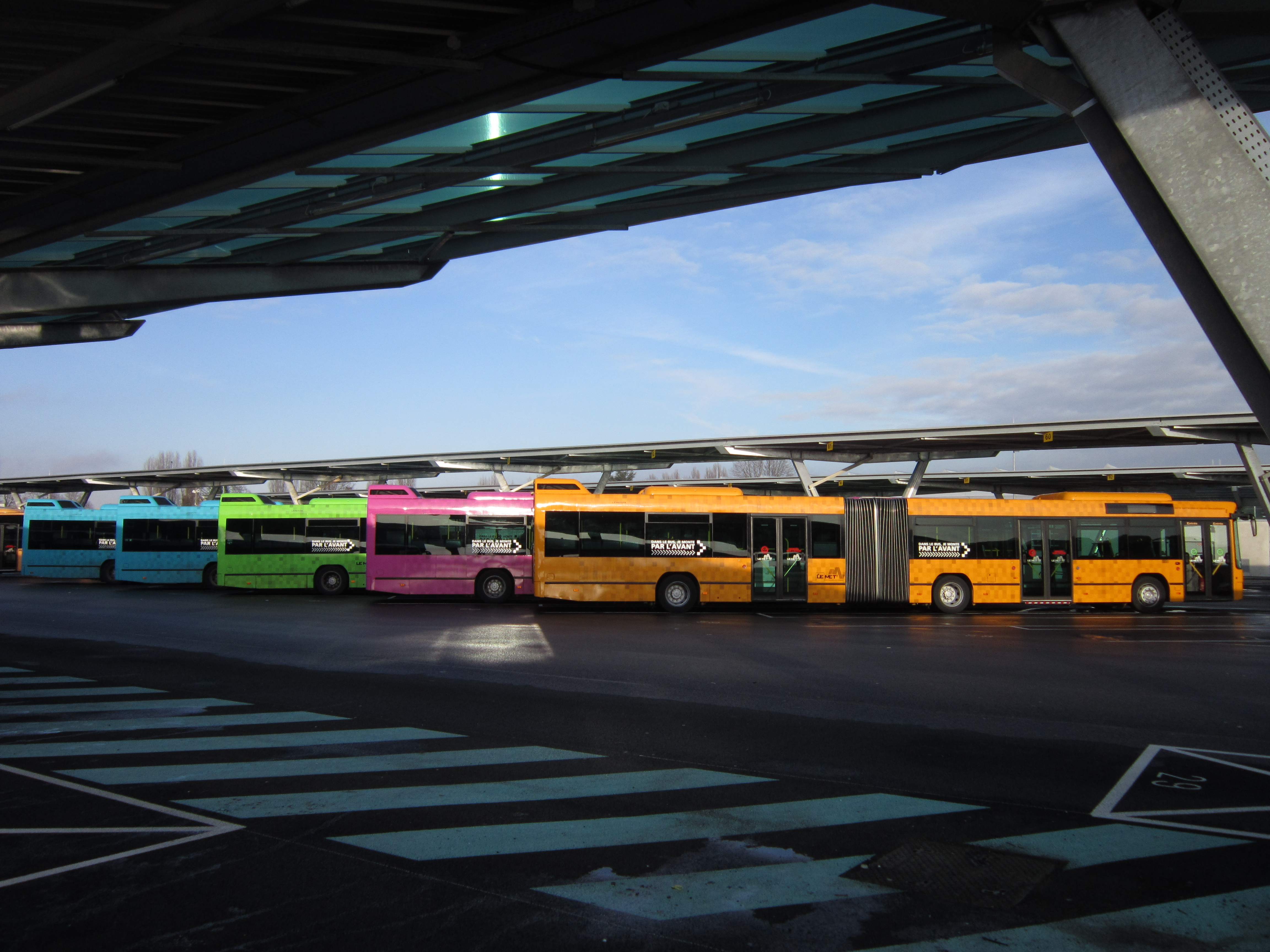 Rangée de bus au dépôt du réseau Le Met'.